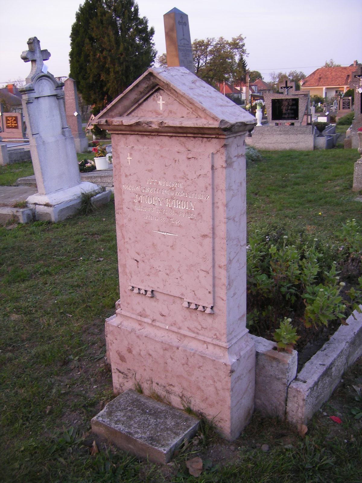 Izsa - Jánoky Károly lelkész síremléke